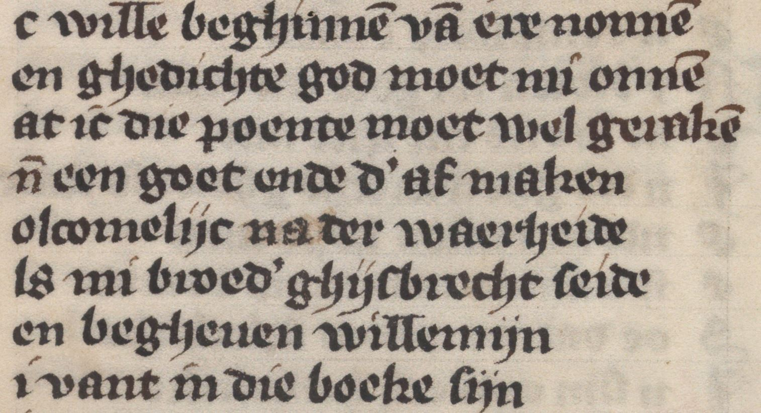 Section of folium 047v from the Beatrijs Ic wille beghinnen van ere nonnen Een ghedichte. God moet mi onnen Dat ic die poente moet wel geraken Ende een goet ende daer af maken Volcomelijc na der waerheide Als mi broeder Ghijsbrecht seide, Een begheven willemijn. Hi vant in die boeke sijn